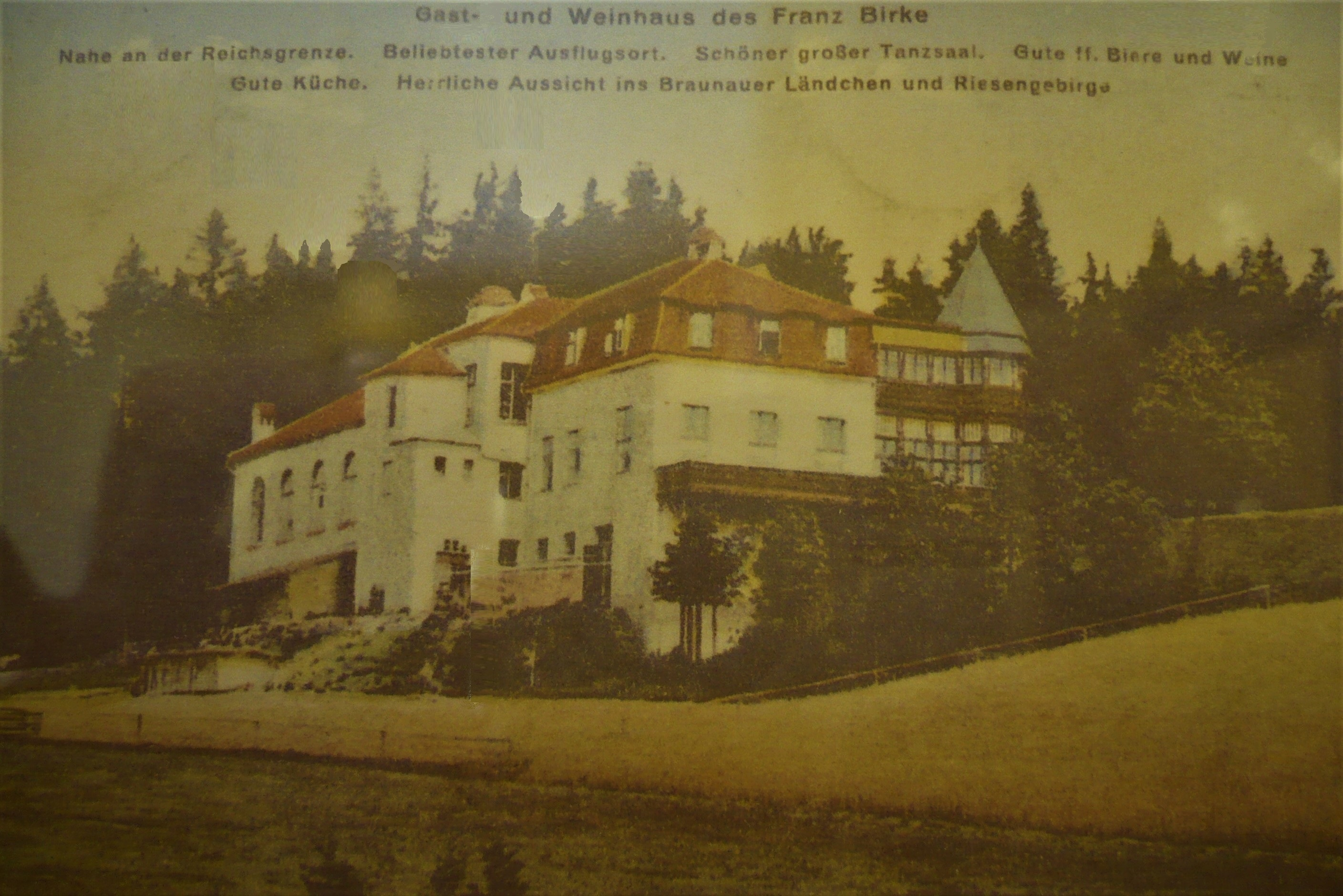 Janovicky. Zajazd Franza Birkego z 1916 r.